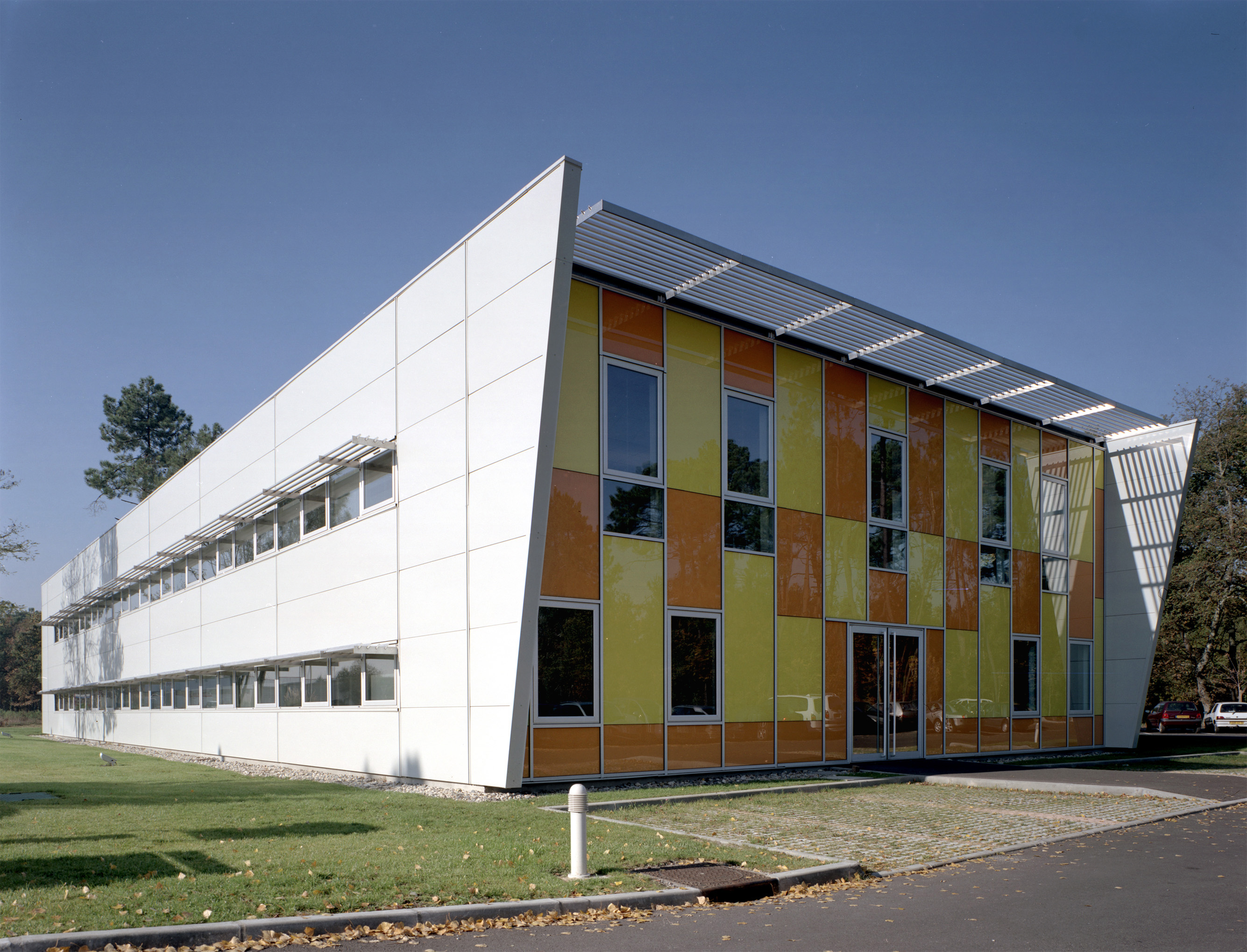 I2S - site de Pessac